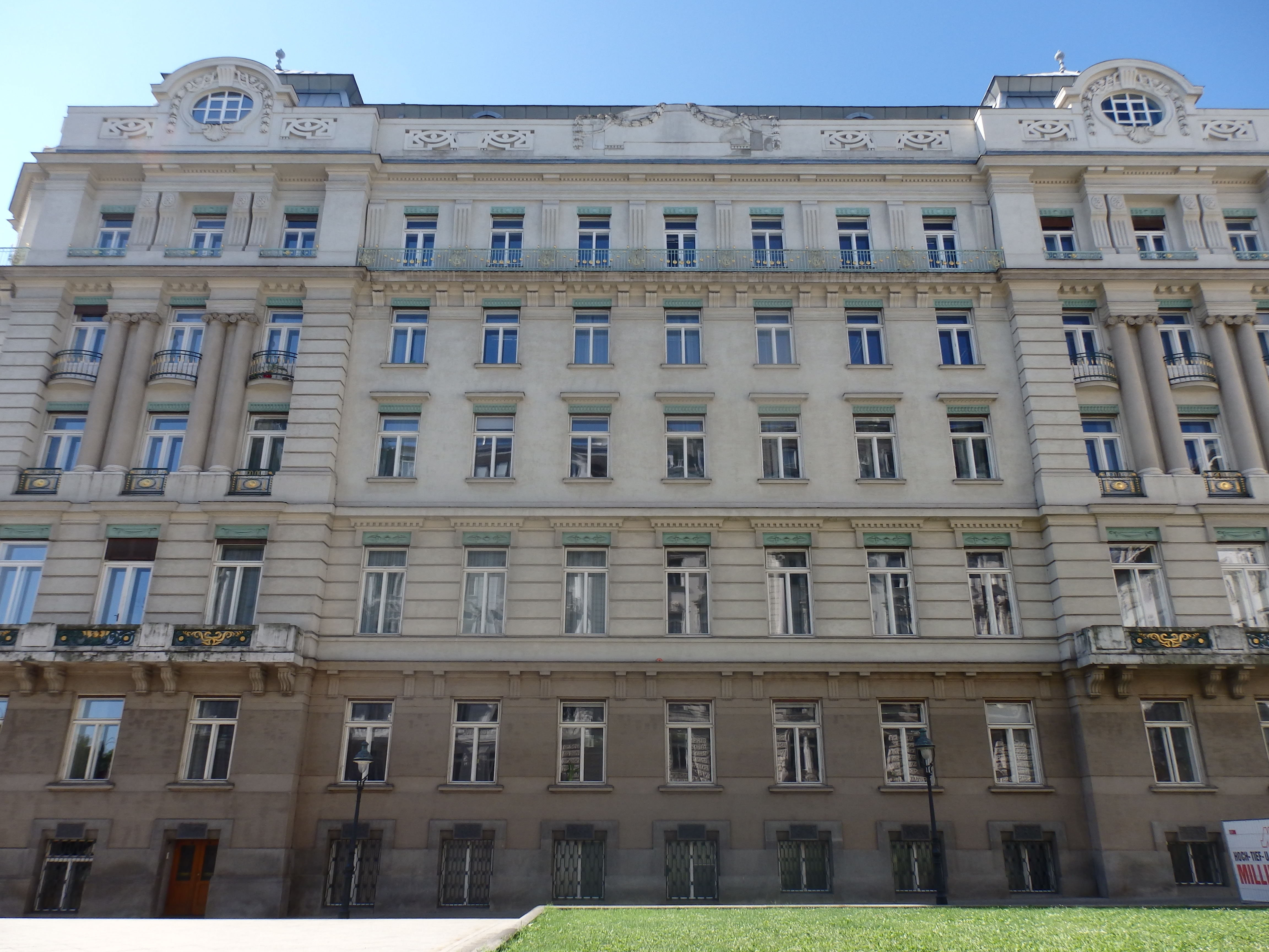 Ehemalige Handelskammer (1905-07) von Ludwig Baumann, heute Wirtschaftskammer, Georg-Coch-Platz 1, Wien-Innere Stadt